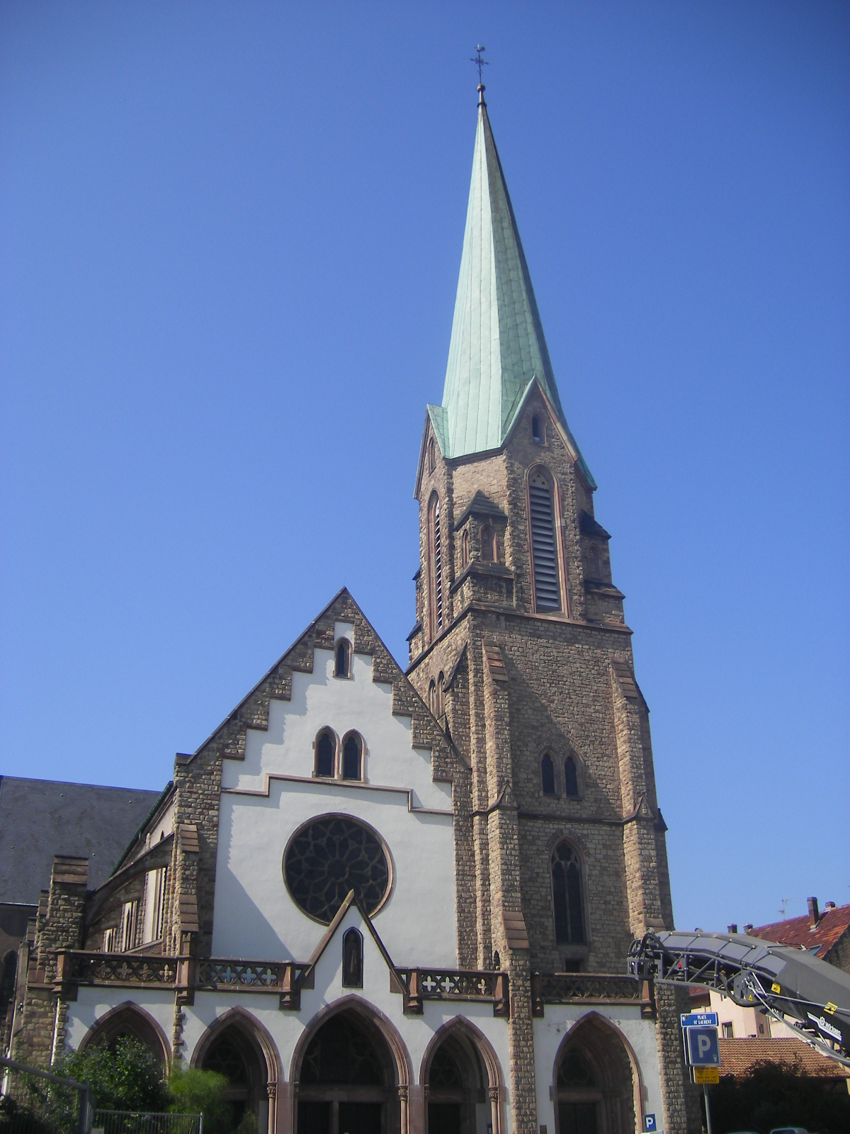 Bischheim